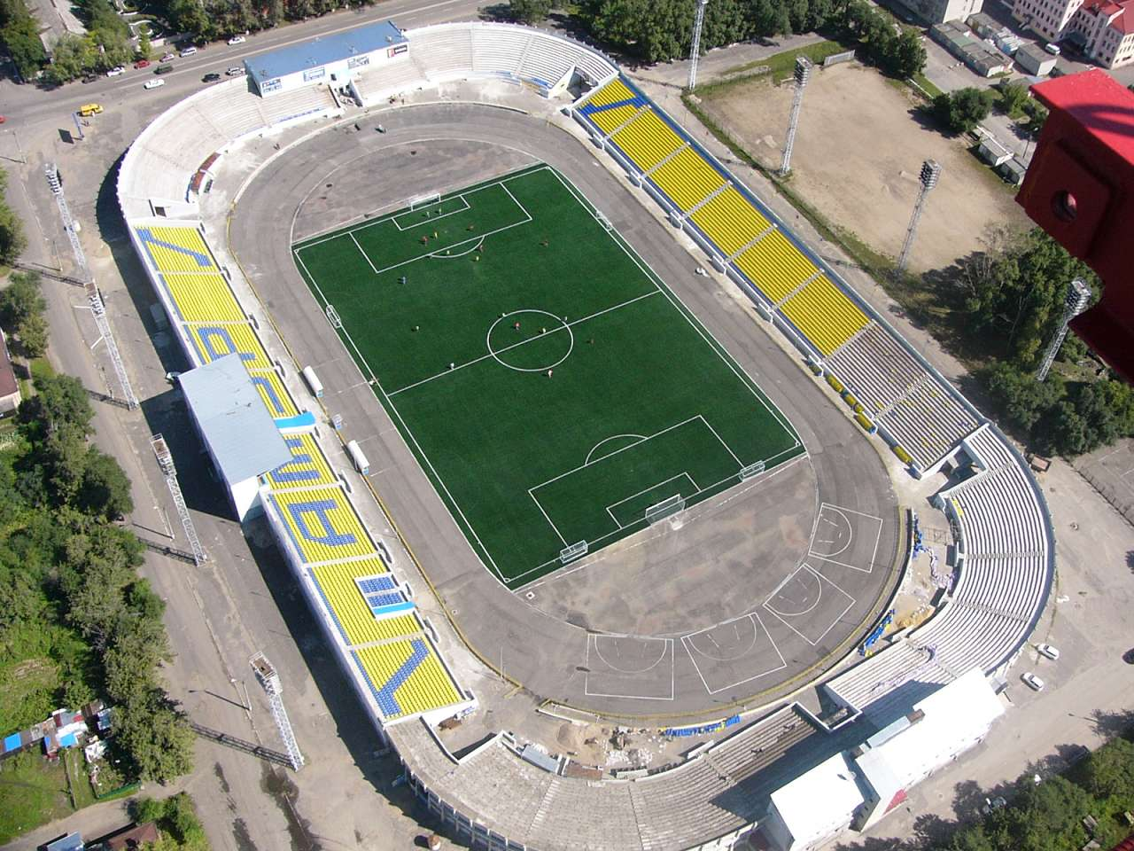 Снимок стадиона Амур с телевизионной башни